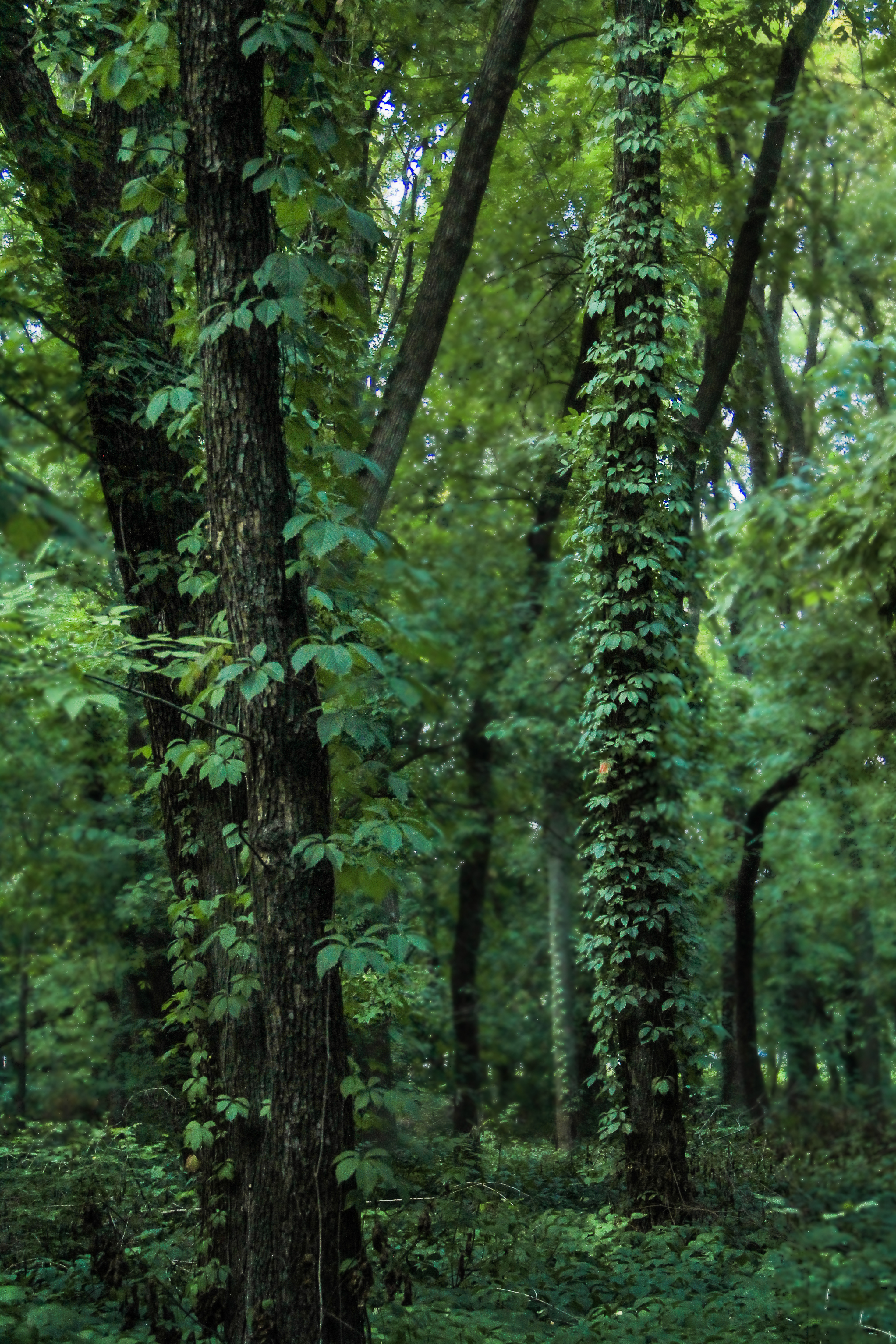 Роща Весна, Новочеркасск This image is related to the protected area of Russia number 6120092